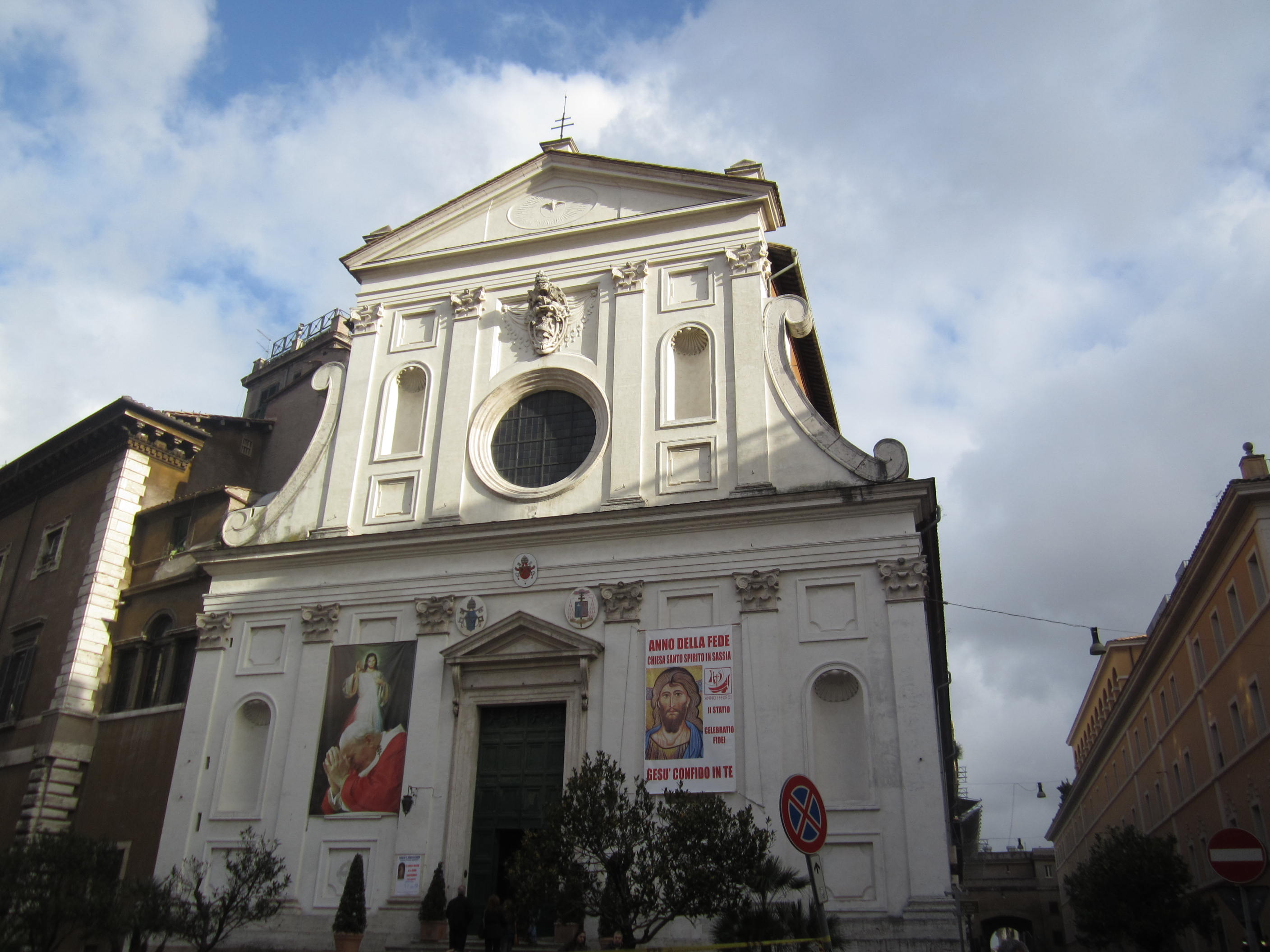 Chiesa di Santo Spirito in Sassia